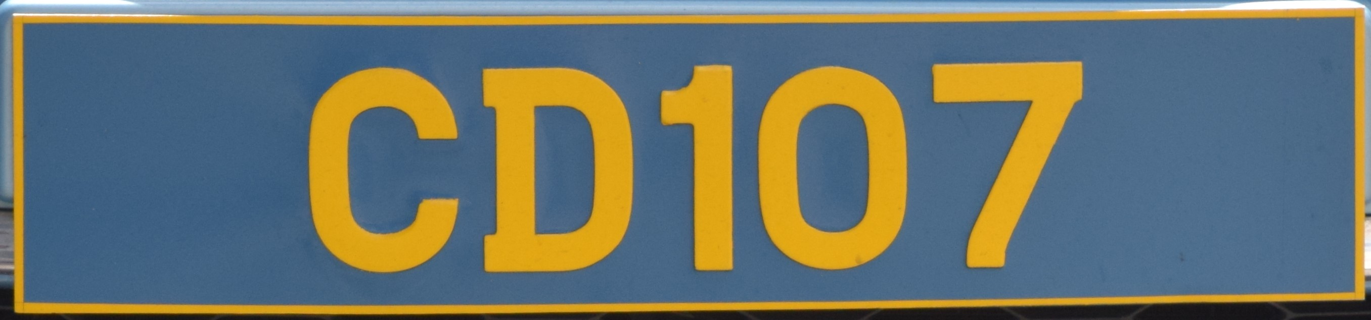 CD plate of Barbados